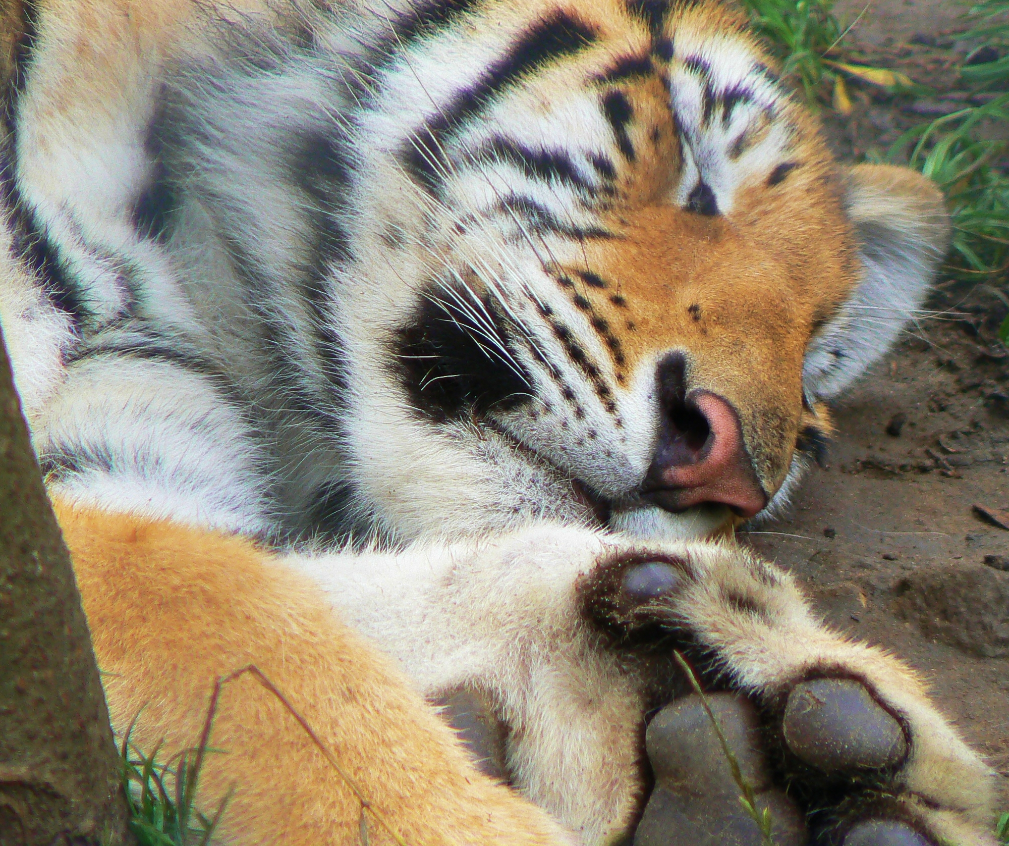 Grote luie kat, Olmen. Besluipen en dan plots boe! roepen.